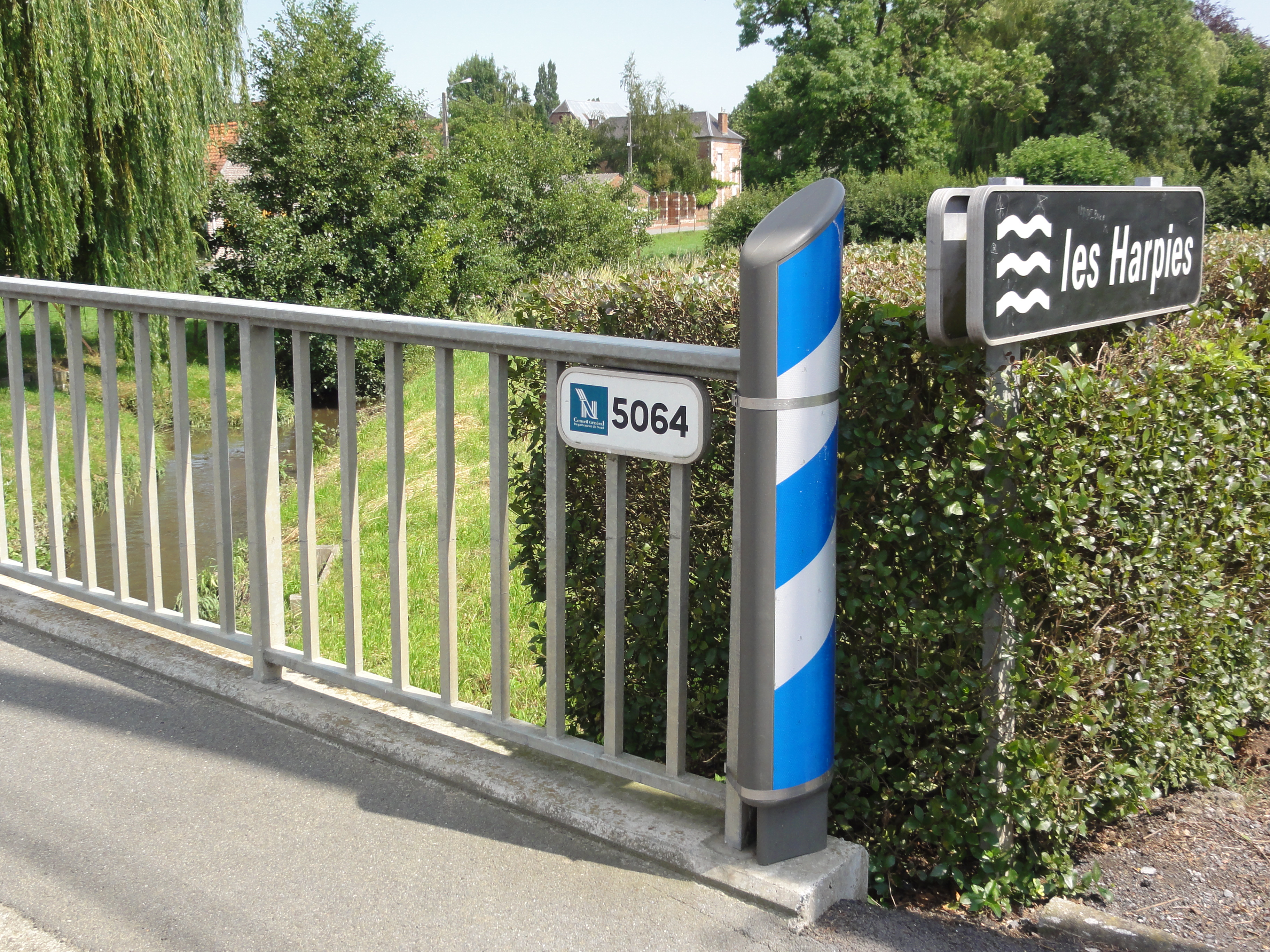 Vertain (Nord, Fr) riviere les Harpies (panneau).